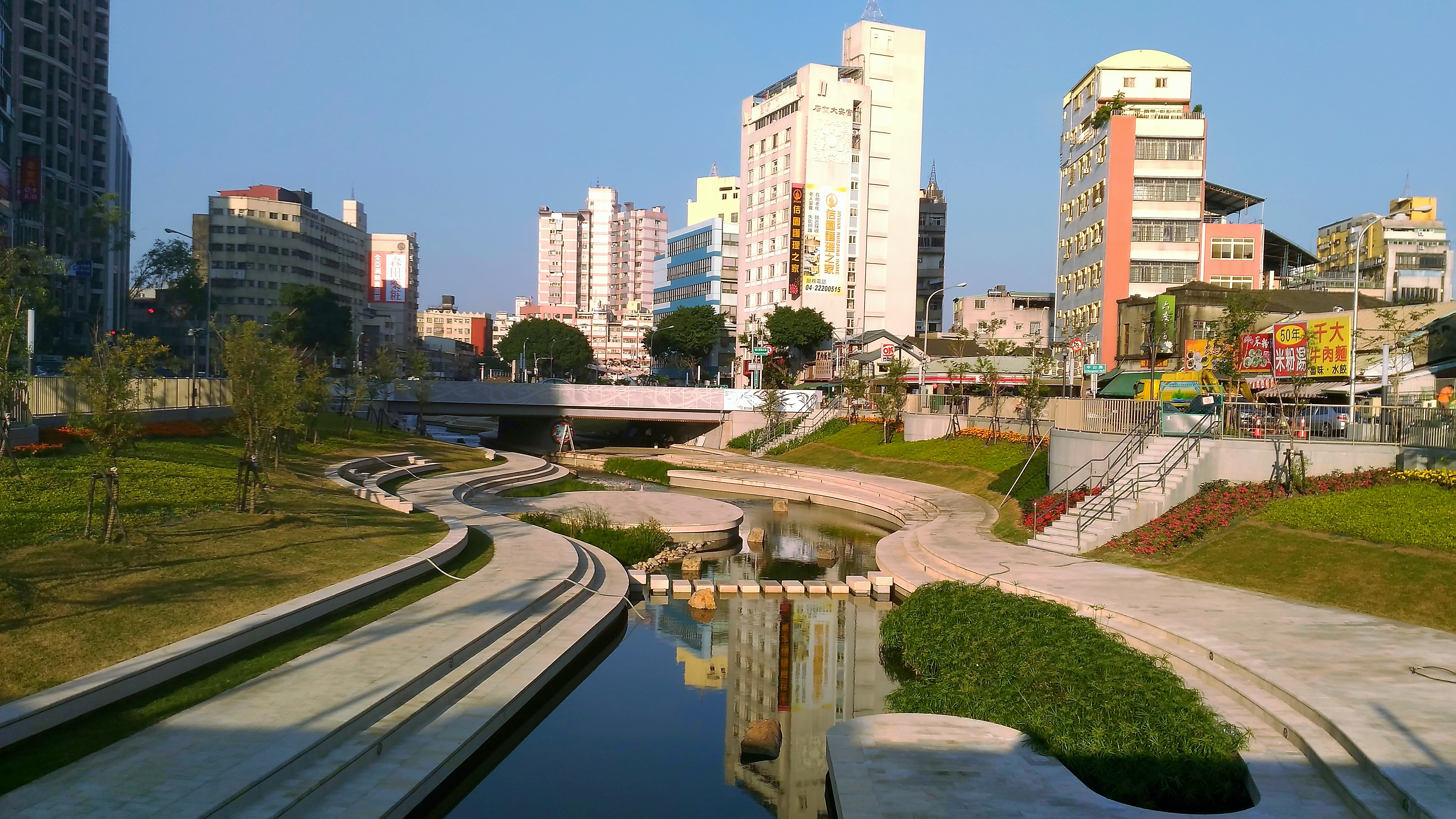 中文（台灣）: 台中市柳川親水景觀段